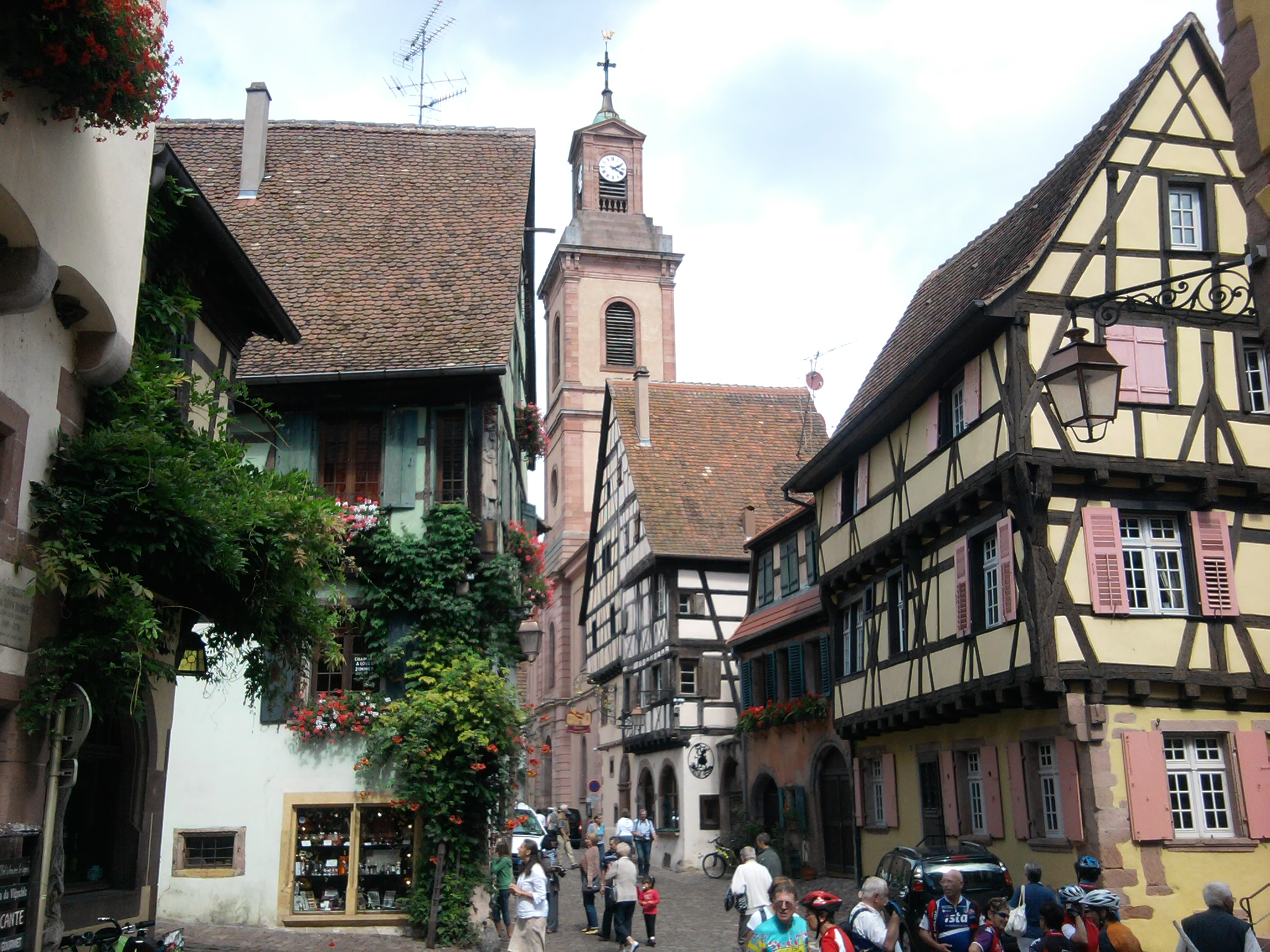 Riquewihr (Elzász, Franciaország)